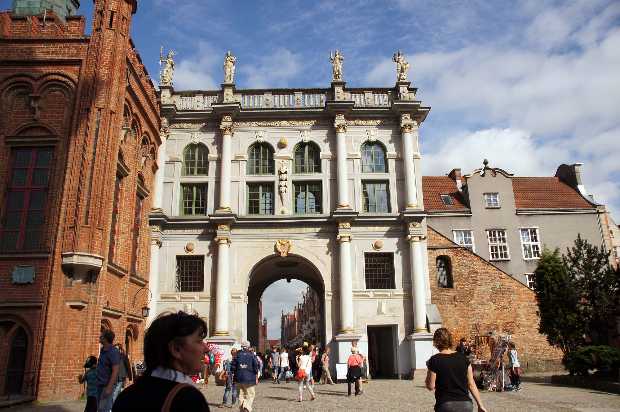 Gdańsk Główne Miasto, ul. Długa - Brama Złota, XIV, XVII